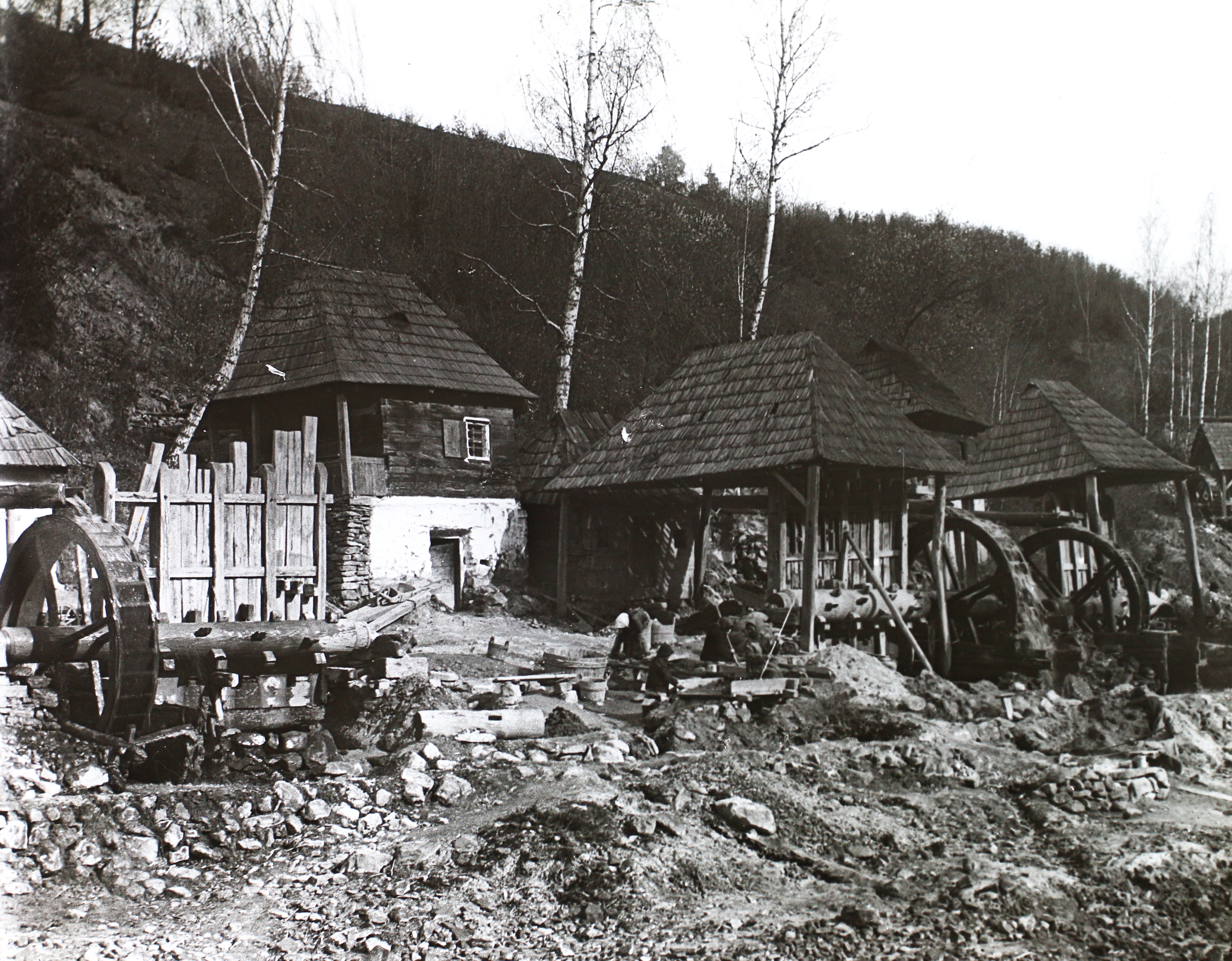 ERDÉLY VERESPATAK aranytartalmú érc aprítására szolgáló un. aranyzúzó 1907-ben.